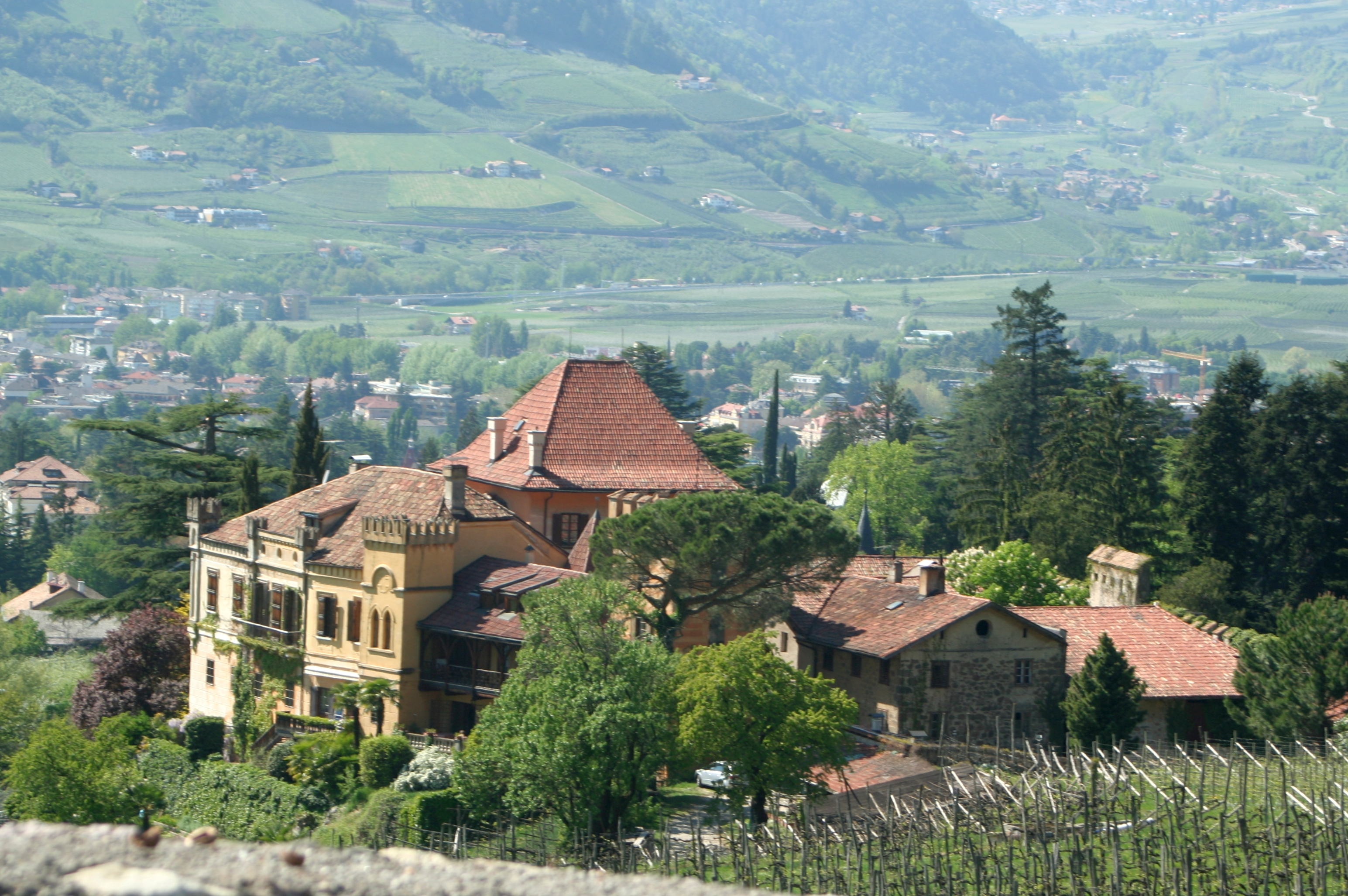 Rametz, Meran, Südtirol